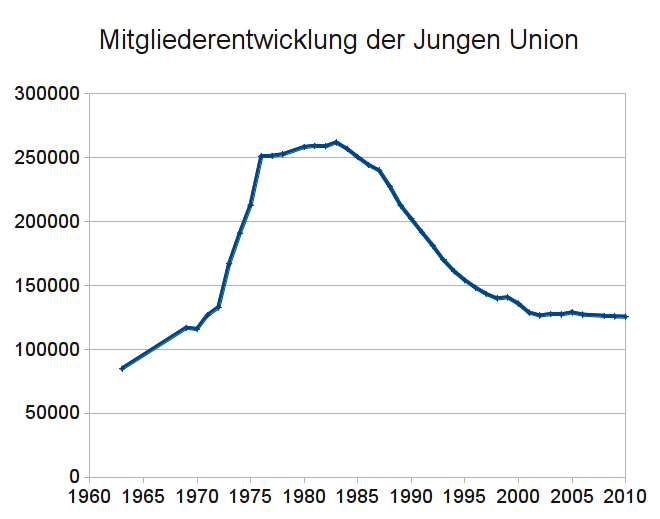 Mitgliederentwicklung der Jungen Union 1963 bis 2010